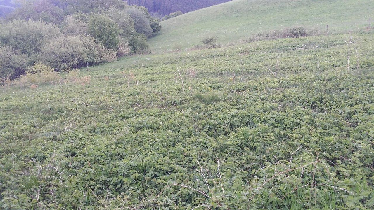 Naturschutzgebiet Extensivgrünland südlich Hagen von Nordwesten im Mai 2020.